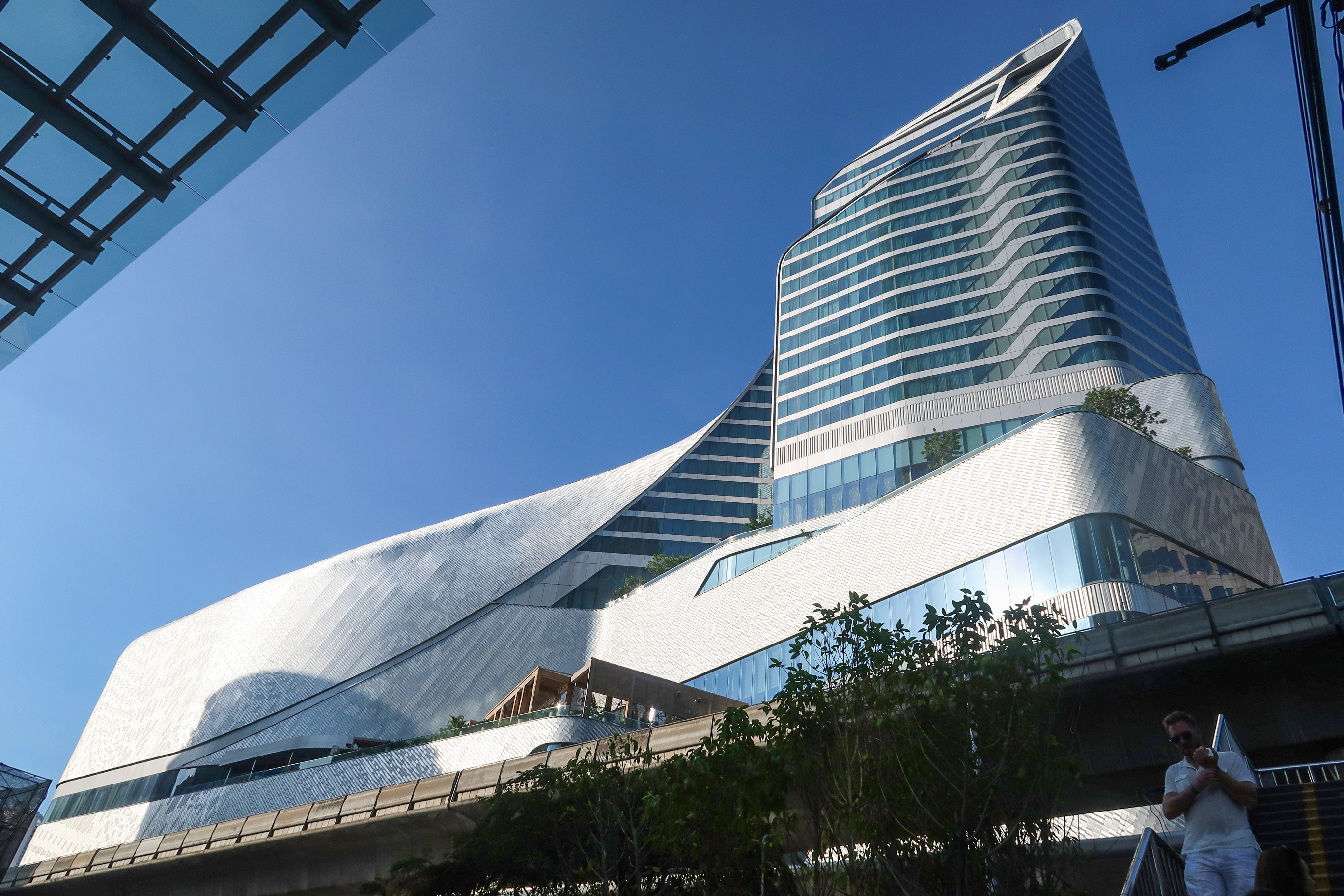 Central embassy